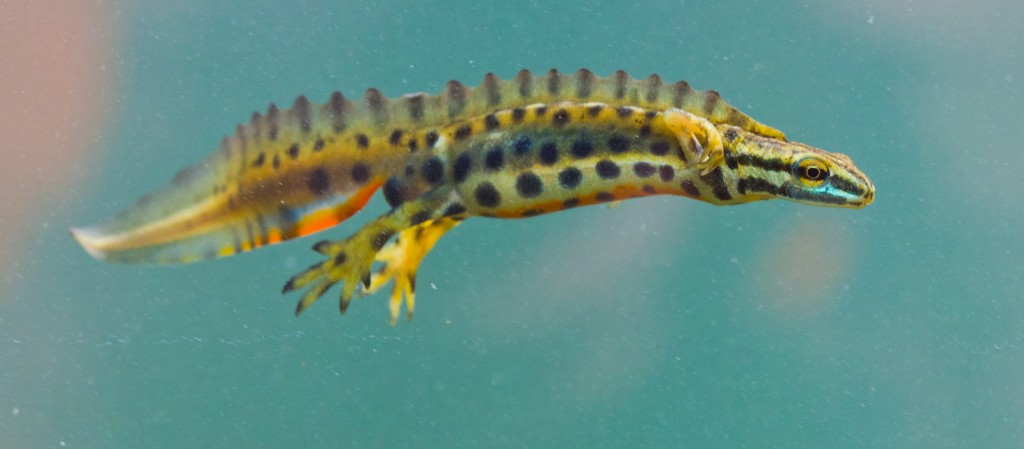 Teichmolch Männchen (Triturus vulgaris) im Hochzeitskleid.